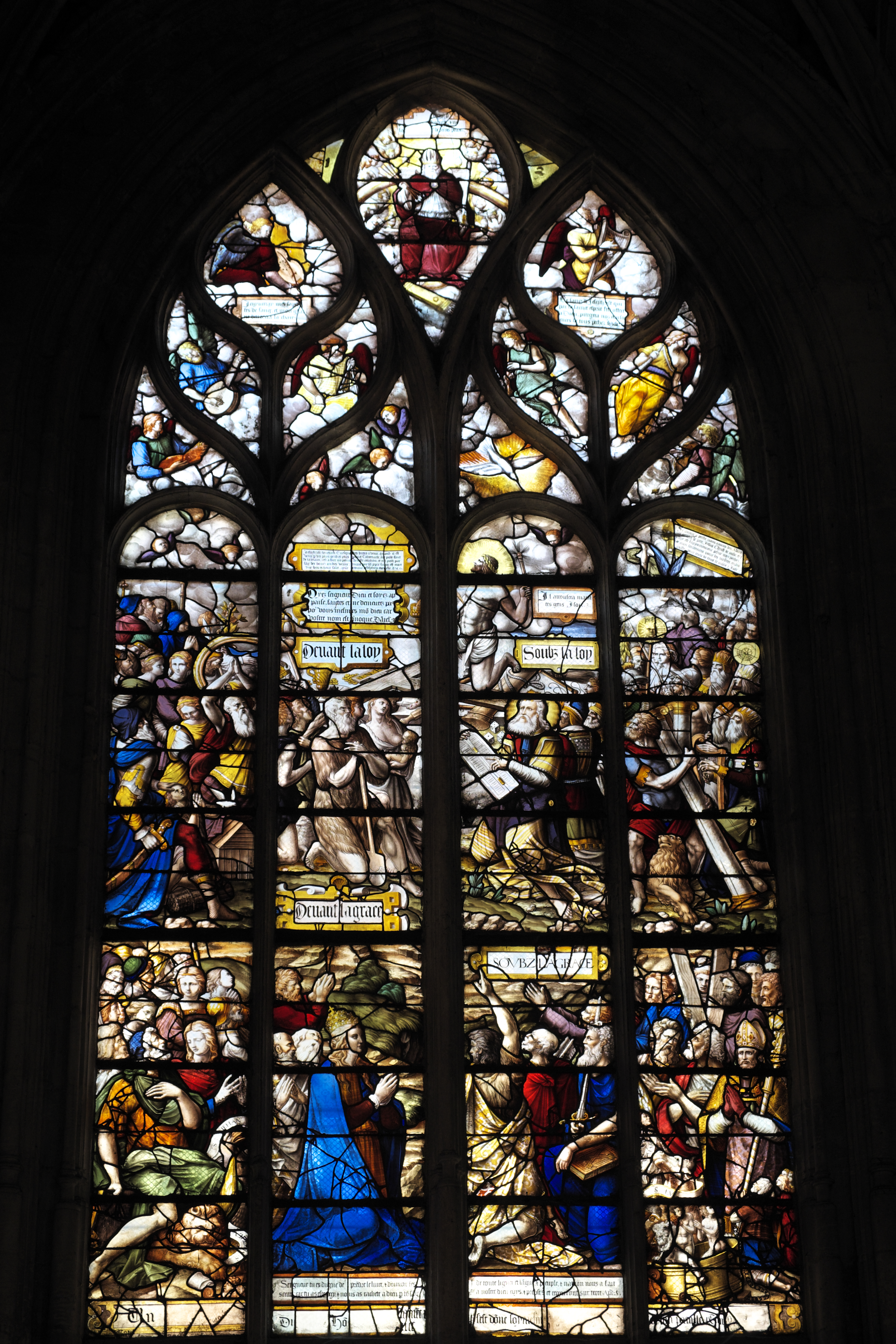 Katholische Kirche Saint-Ouen in Pont-Audemer im Département Eure (Haute-Normandie/Frankreich), Bleiglasfenster aus dem 16. Jahrhundert, Darstellung: Erlösung